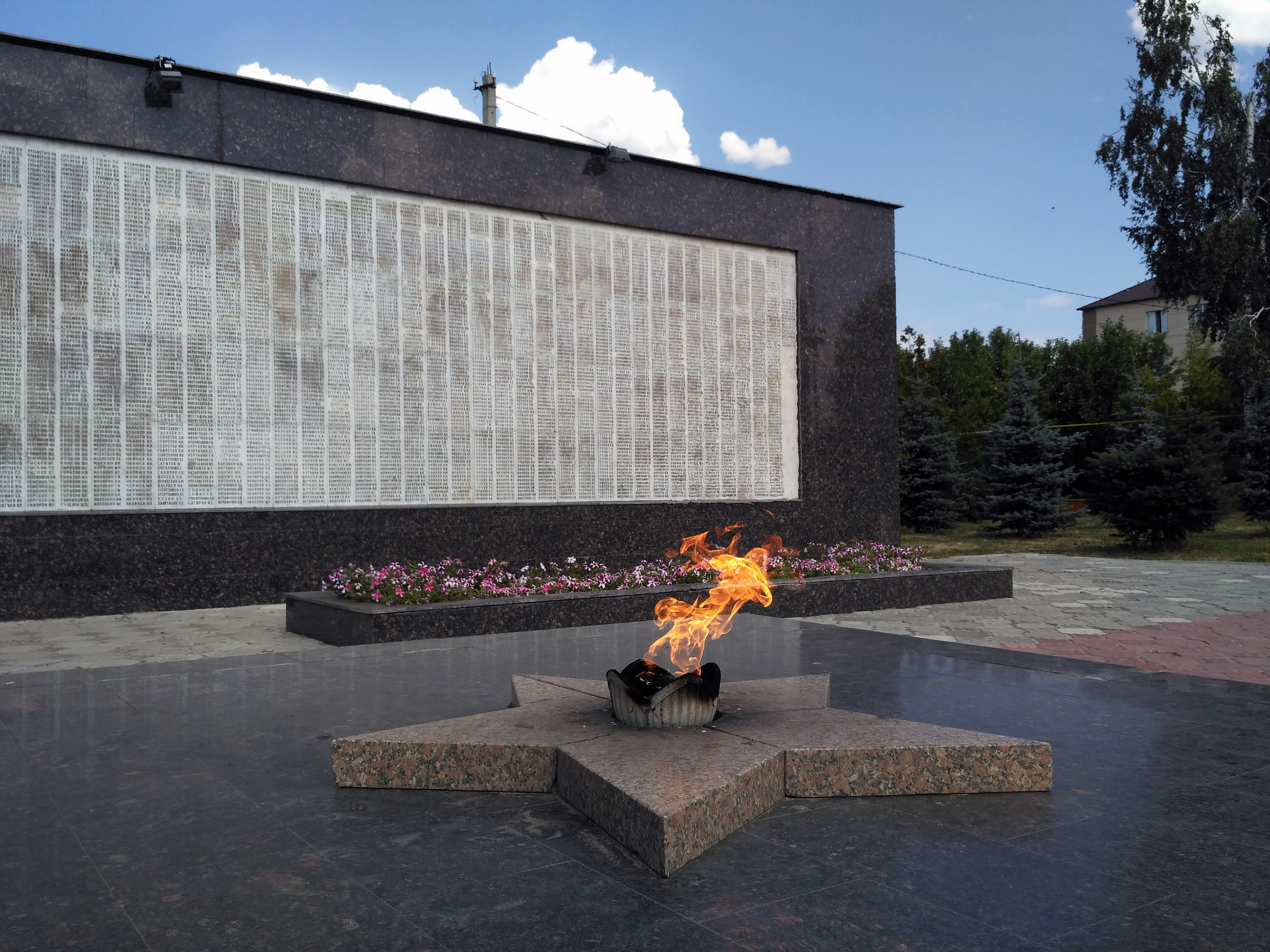 Вечный огонь в городе Нурлат